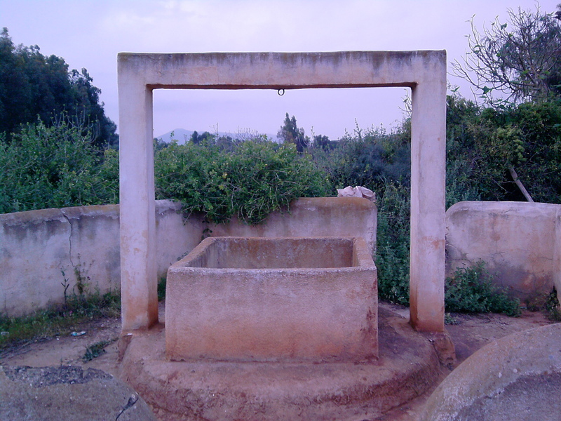 قرى المغرب